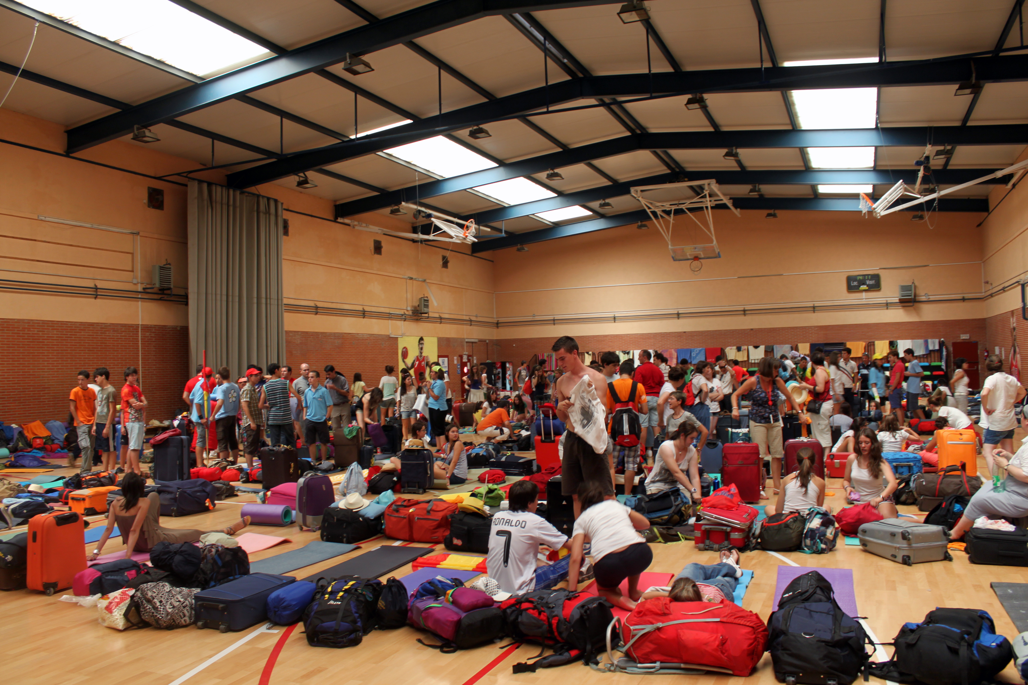 Polideportivo de acogida en la JMJ.